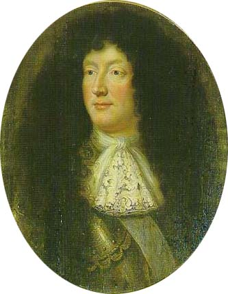 Christian I. (Ludwig) von Mecklenburg (1623-1692)